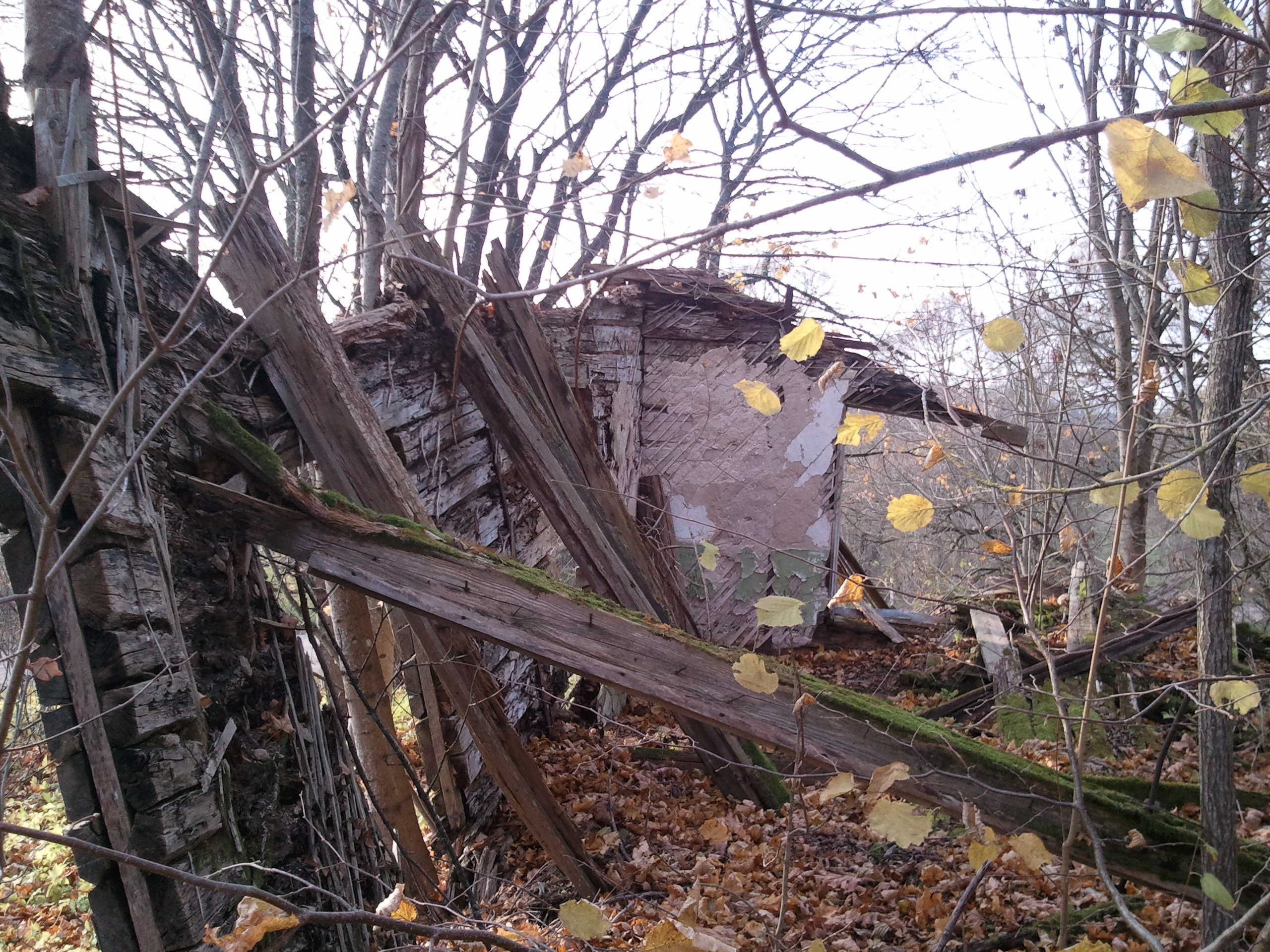 Noliškio dvaro pastato griuvenos